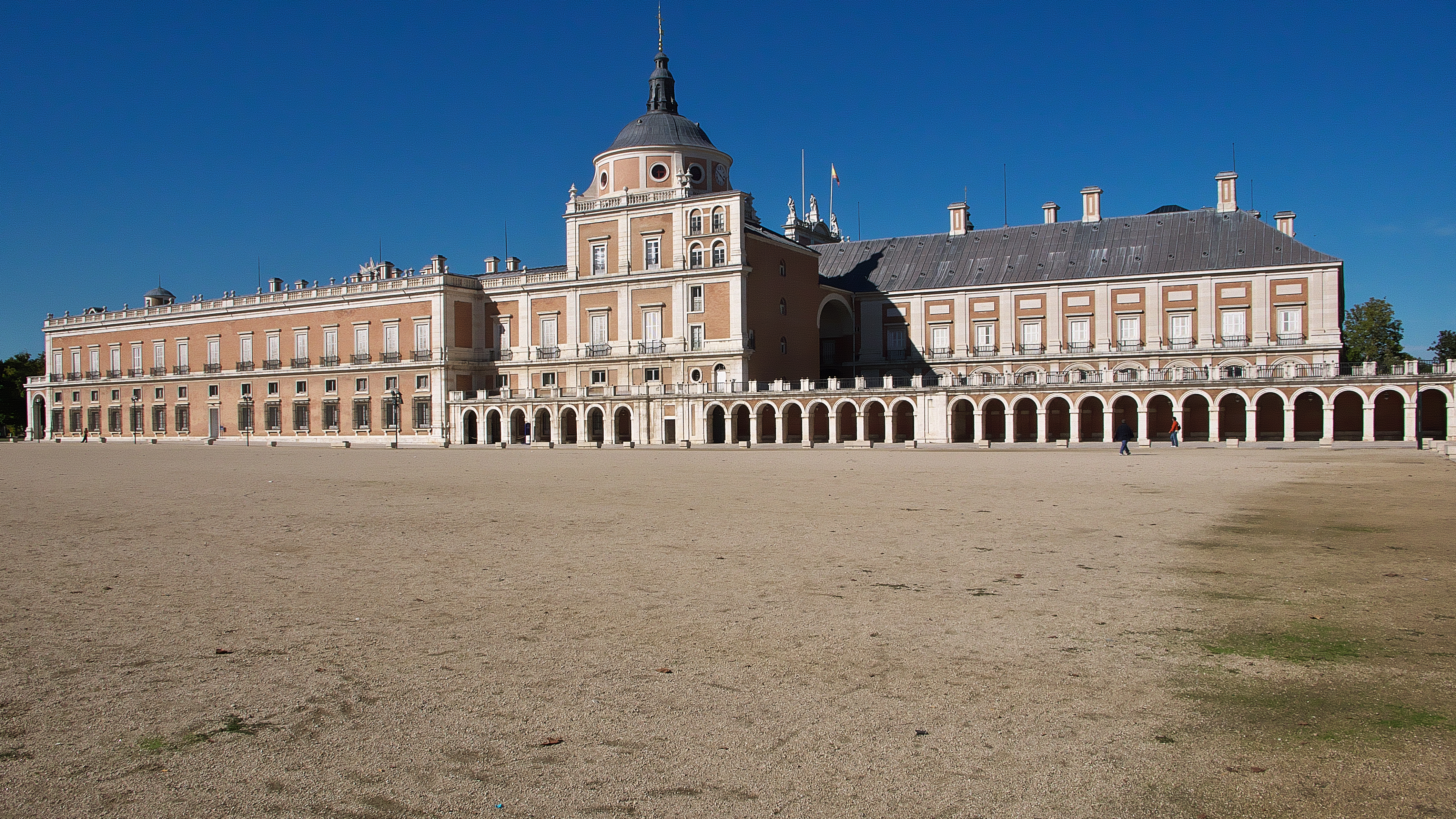 Palacio Real. Juan Bautista de Toledo, Juan de Herrera, Santiago Bonavia, Sabatini ... lo mejor del momento.